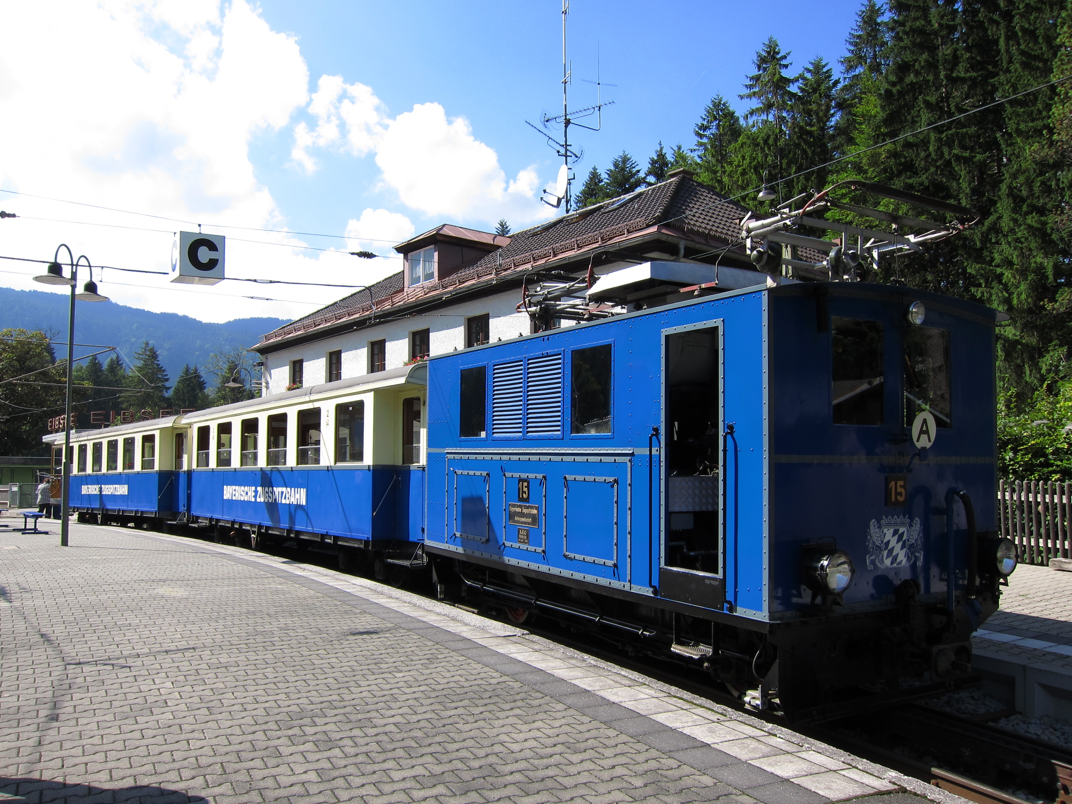 80 Jahre auf dem Buckel, aber auf jeden Fall immer noch schön anzuschauen. Der historische Zug der Bayerischen Zugspitzbahn. Es gibt übrigens regelmäßig historische Fahrten auf die Zugspitze. Mit Fotohalt und so. Mehr auf der Homepage der Bayrischen Zugspitzbahn.